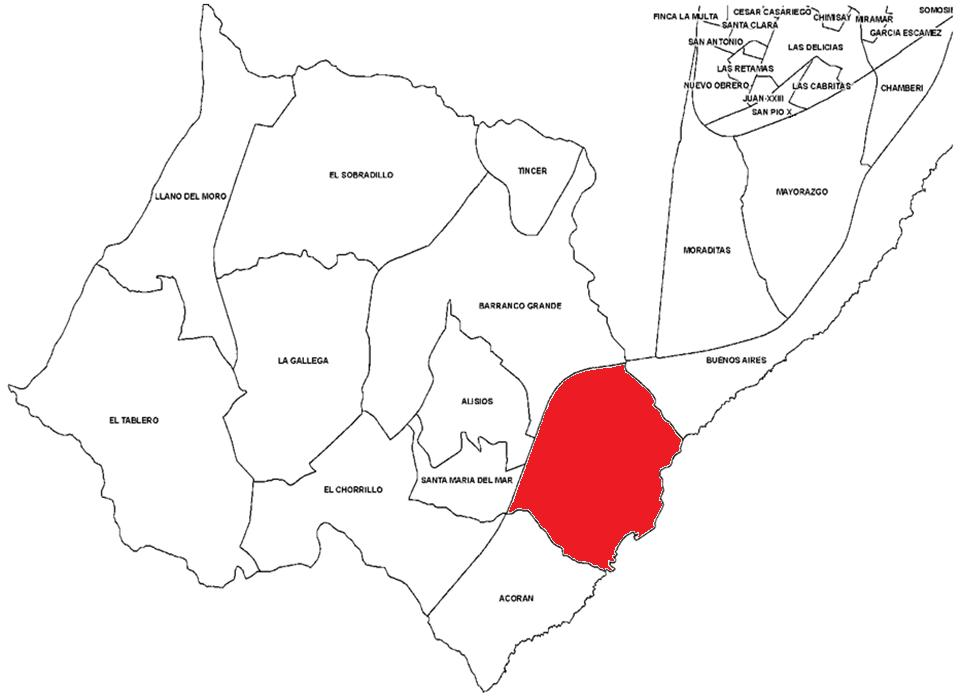 Localización del barrio de Añaza en el distrito Suroeste